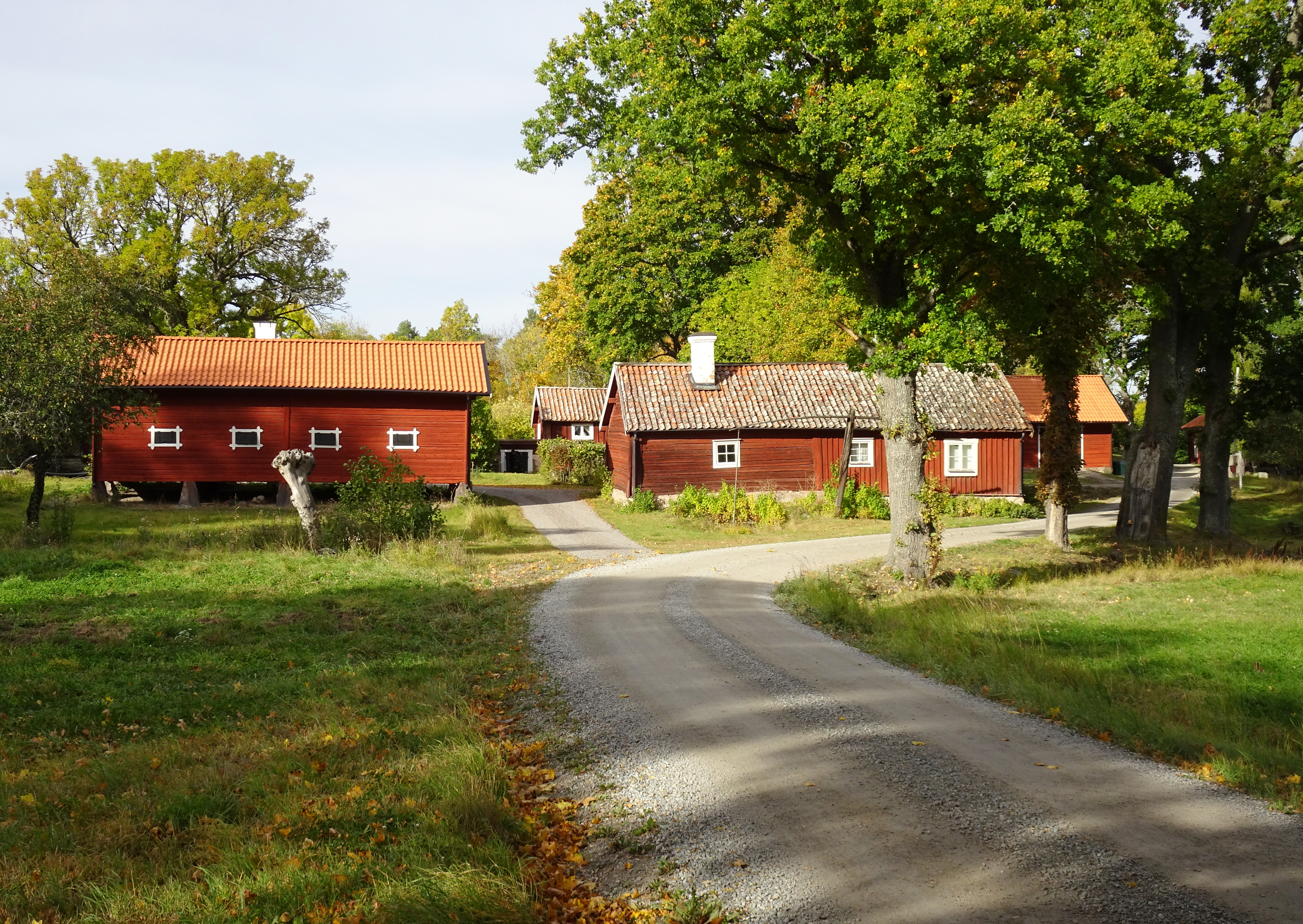 Äleby, Enhörna